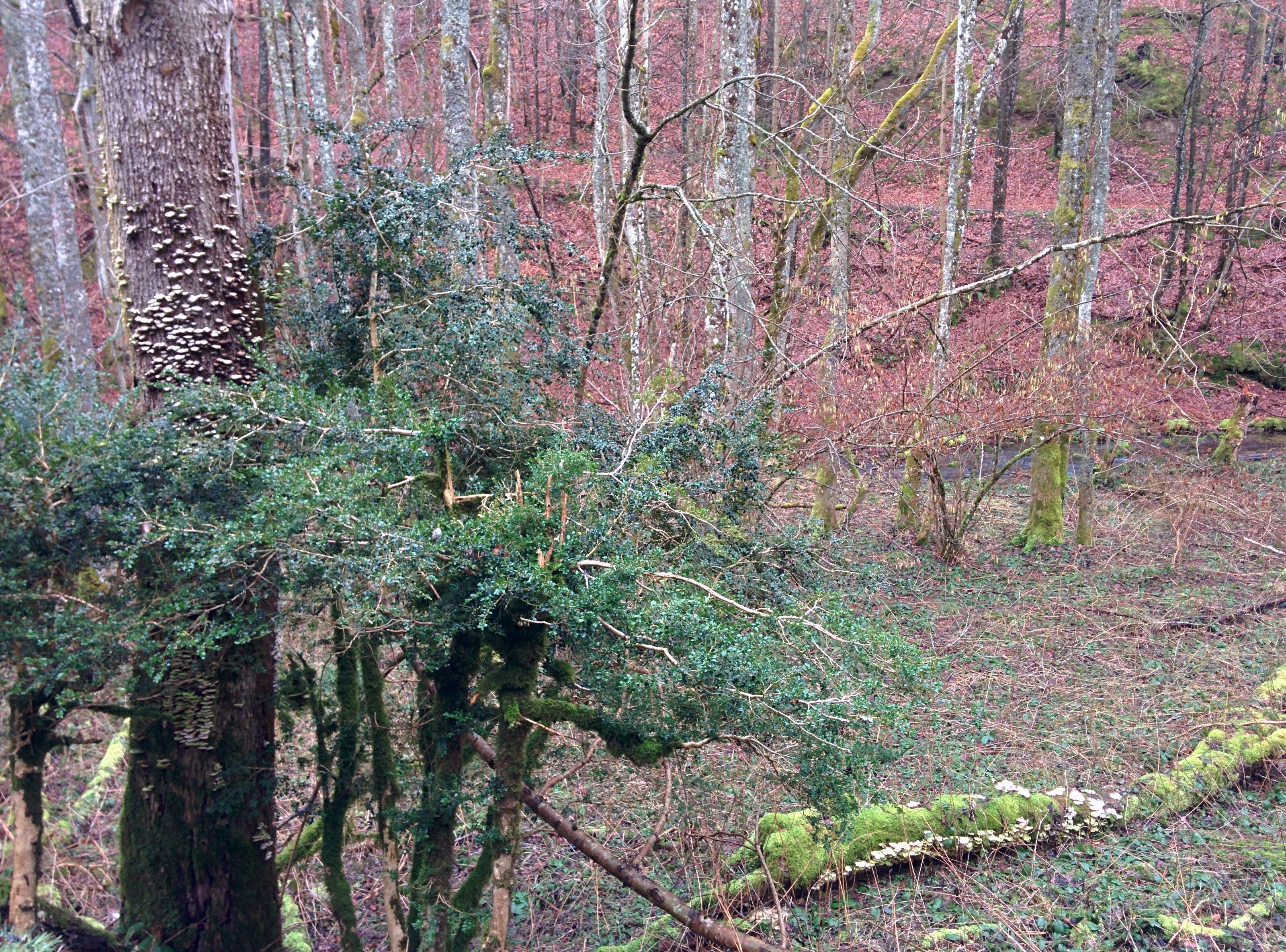 Gorges de la Bourne en hiver, janvier 2016